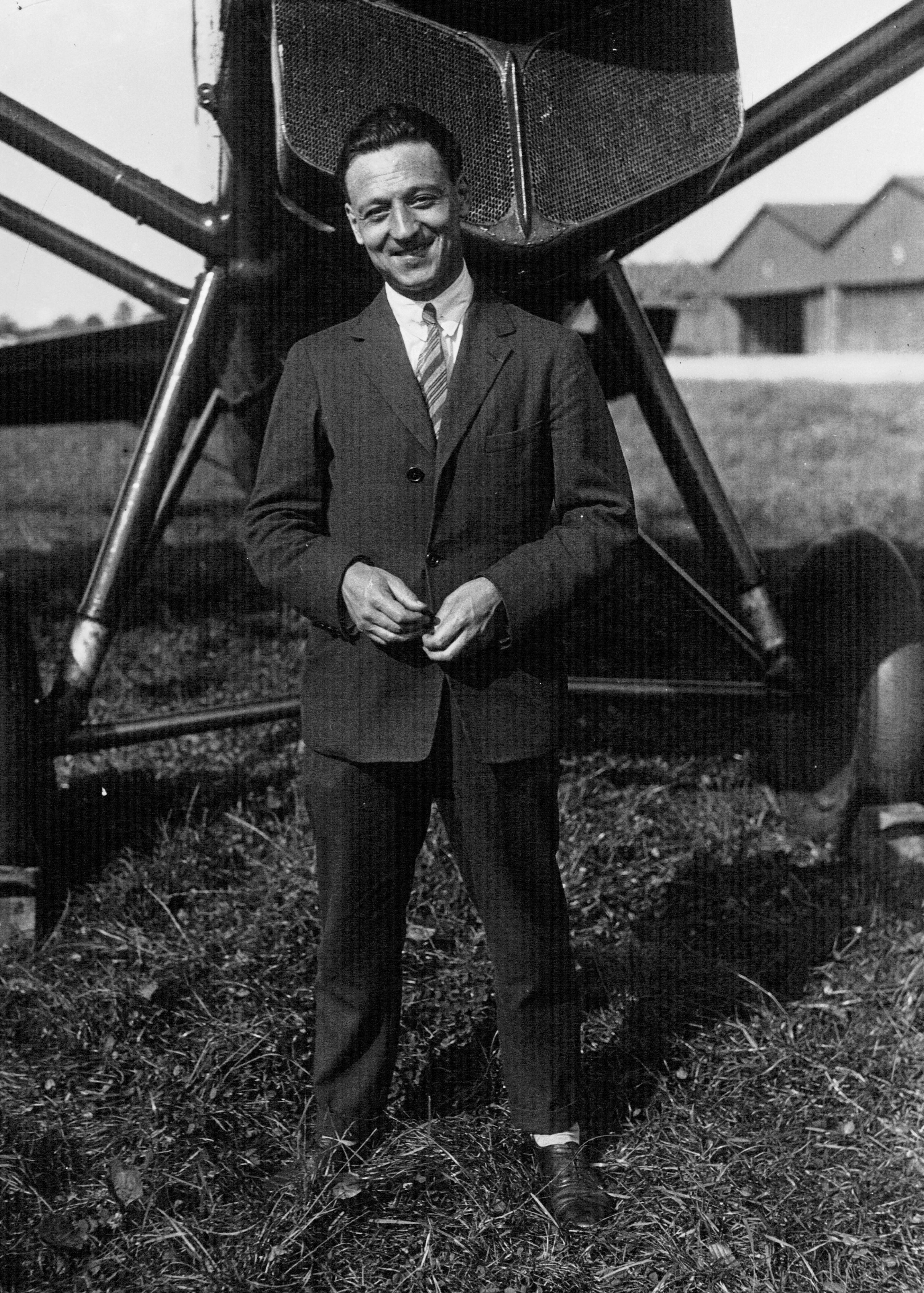 Villacoublay, visite de M. Bokanowski : De Marmier près de son Potez : photographie de presse